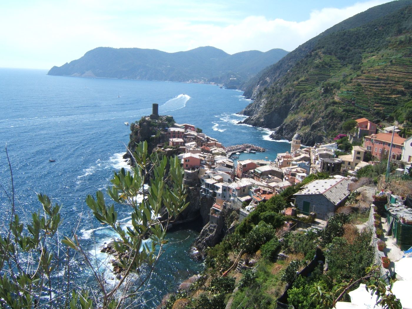 Vernazza and harbor